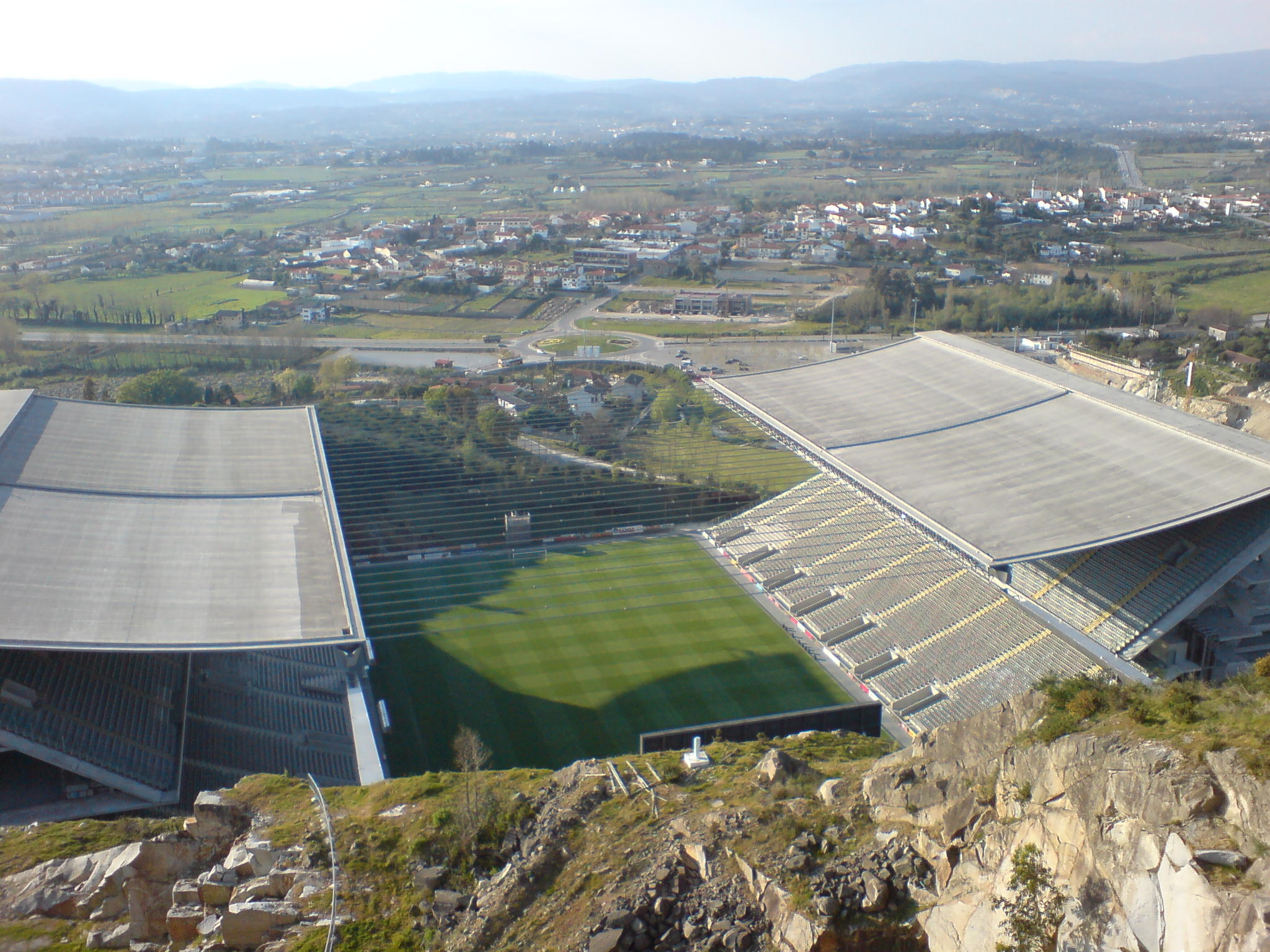 Eduardo Souto de Moura - Braga Stadium 02.jpg